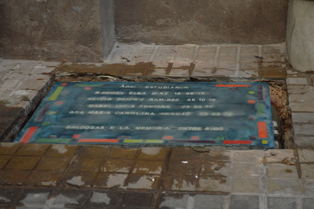 Baldosas por la Memoria en la Facultad de Ciencias de la Educación UNER